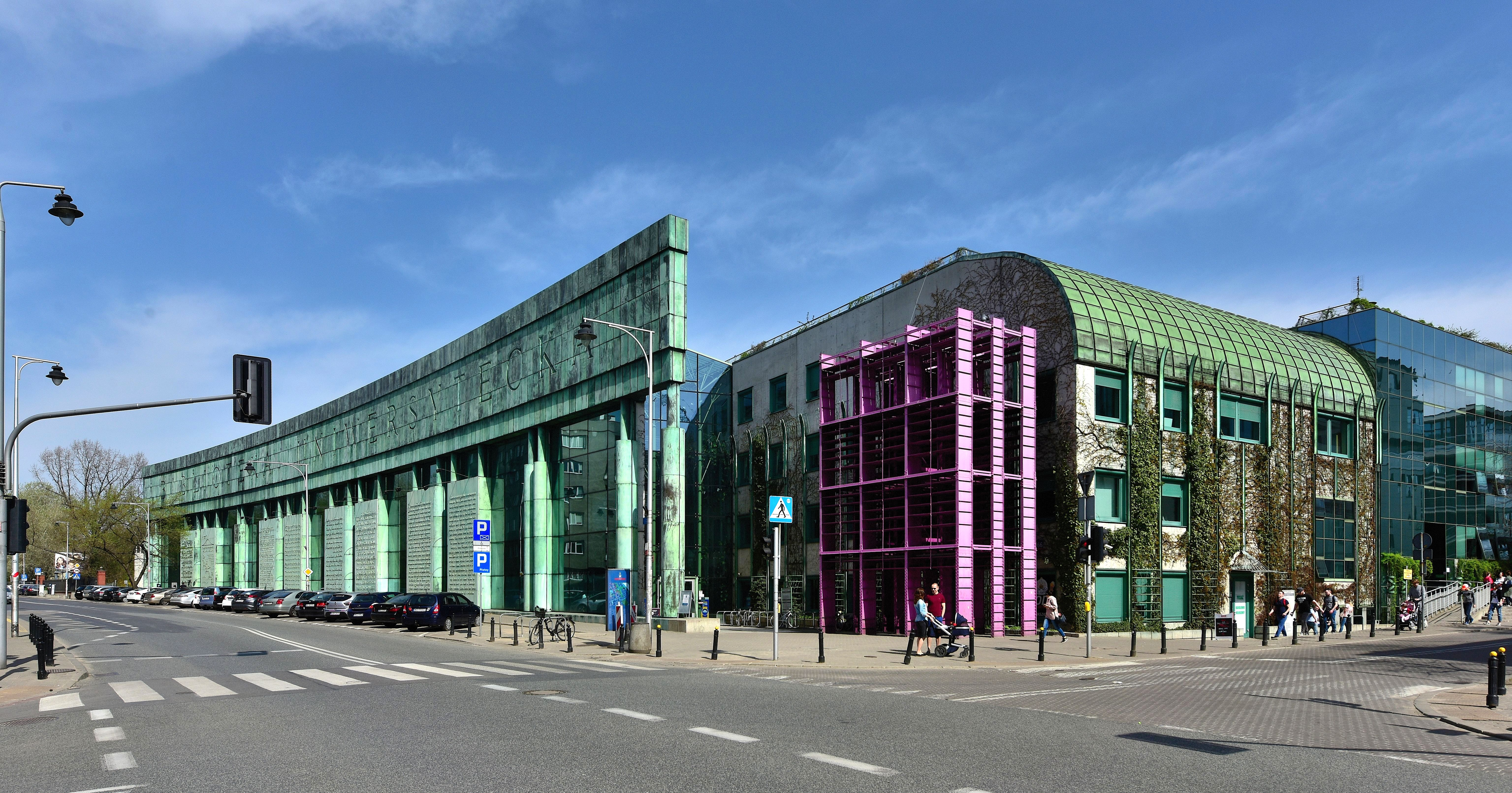 Biblioteka Uniwersytecka w Warszawie, widok od strony ul. Dobrej